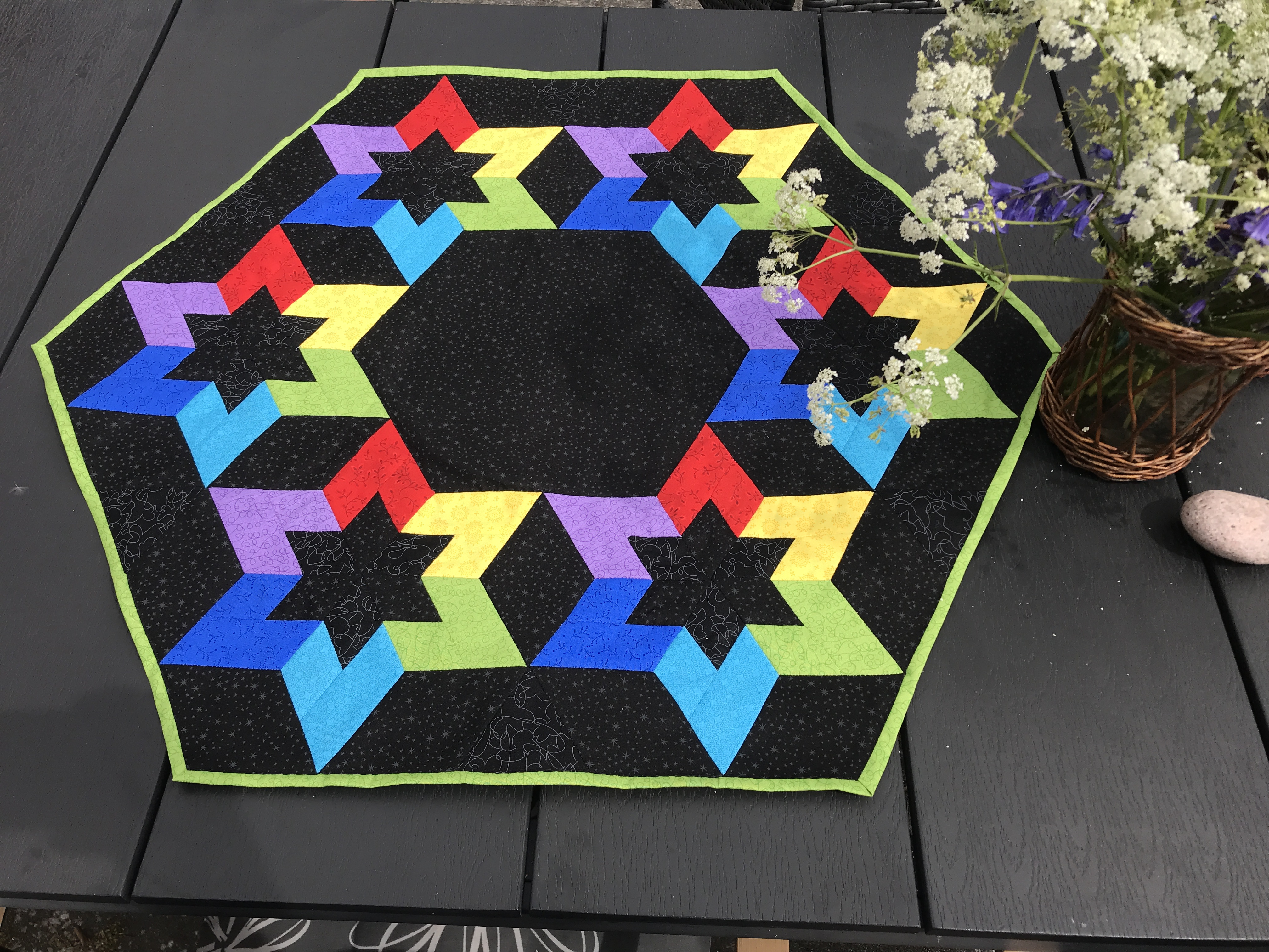 Meget smukt håndsyet dug i flotte farver ( alle regnbuen) med den sorte som kontrast.